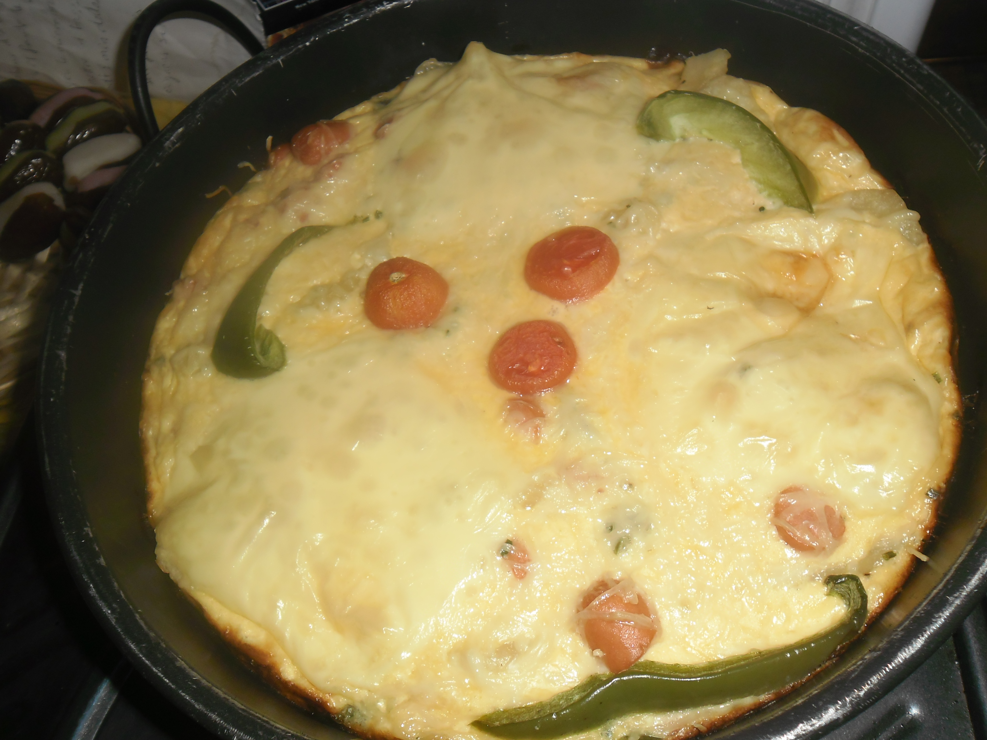 Quiche sans pâte aux restes